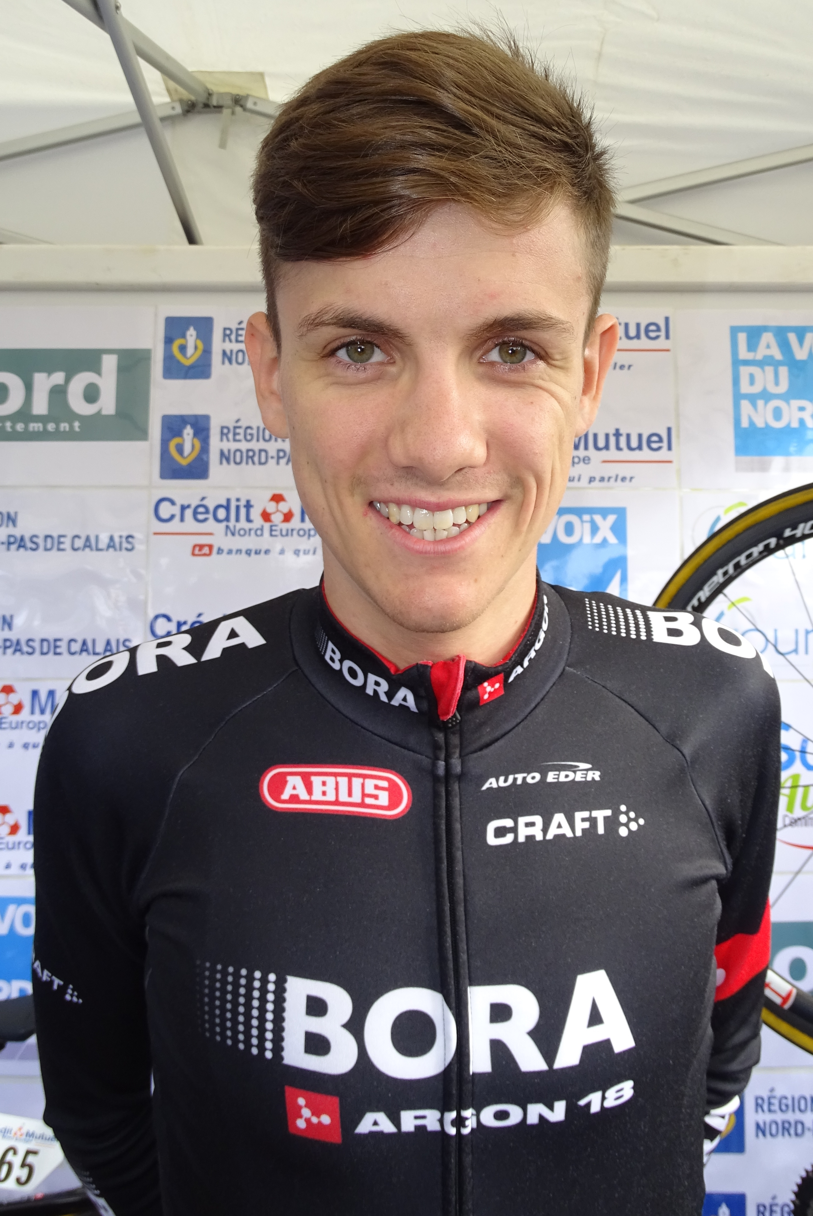 Reportage réalisé le dimanche 6 septembre à l'occasion du départ et de l'arrivée du Grand Prix de Fourmies 2015 à Fourmies, Nord-Pas-de-Calais, France.